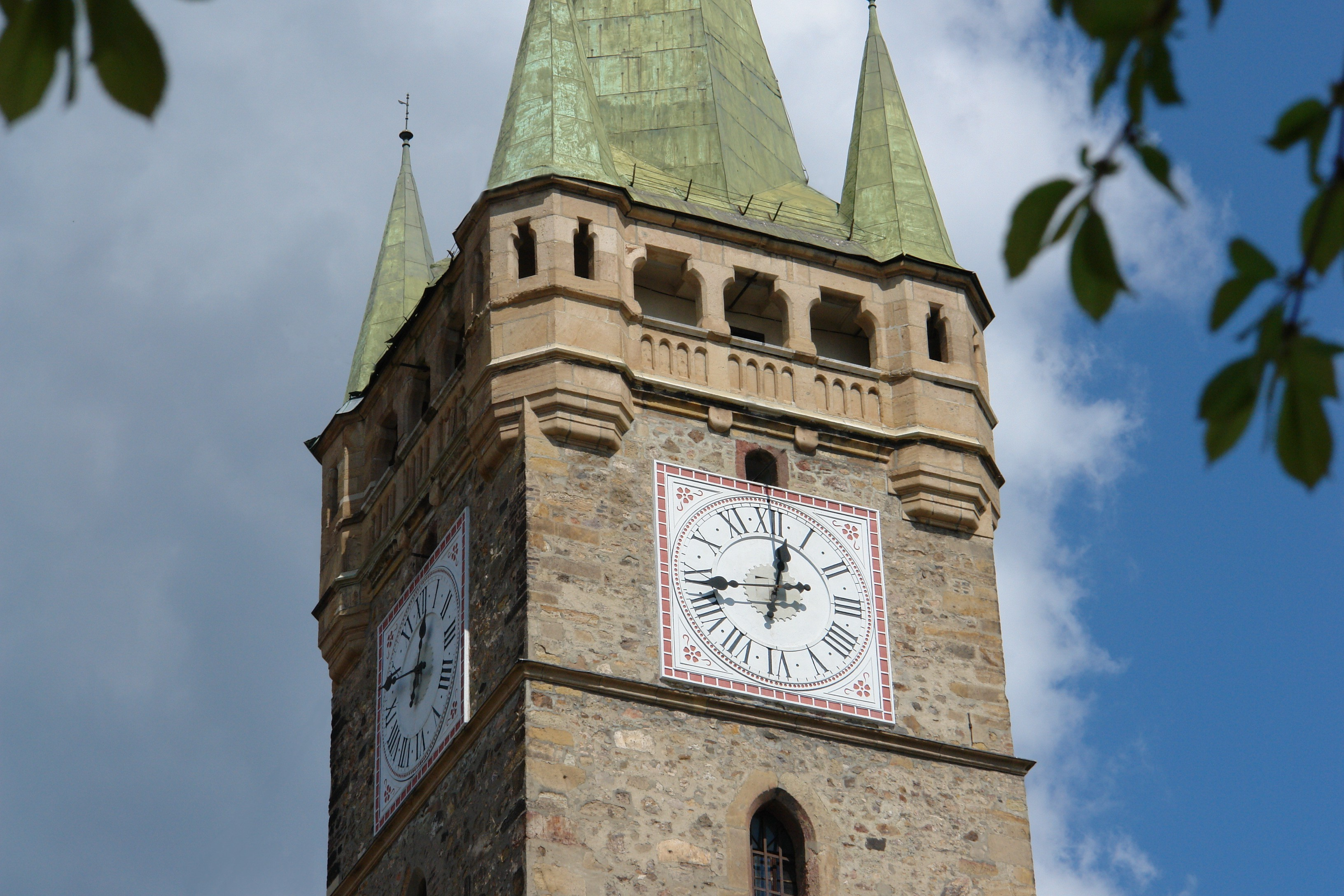 Szent István toronyRomână: Turnul Ştefan